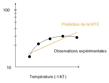 Représentation des valeurs attendues par la théorie métabolique et celle observé lors des expériences d'Englund et al. en 2011